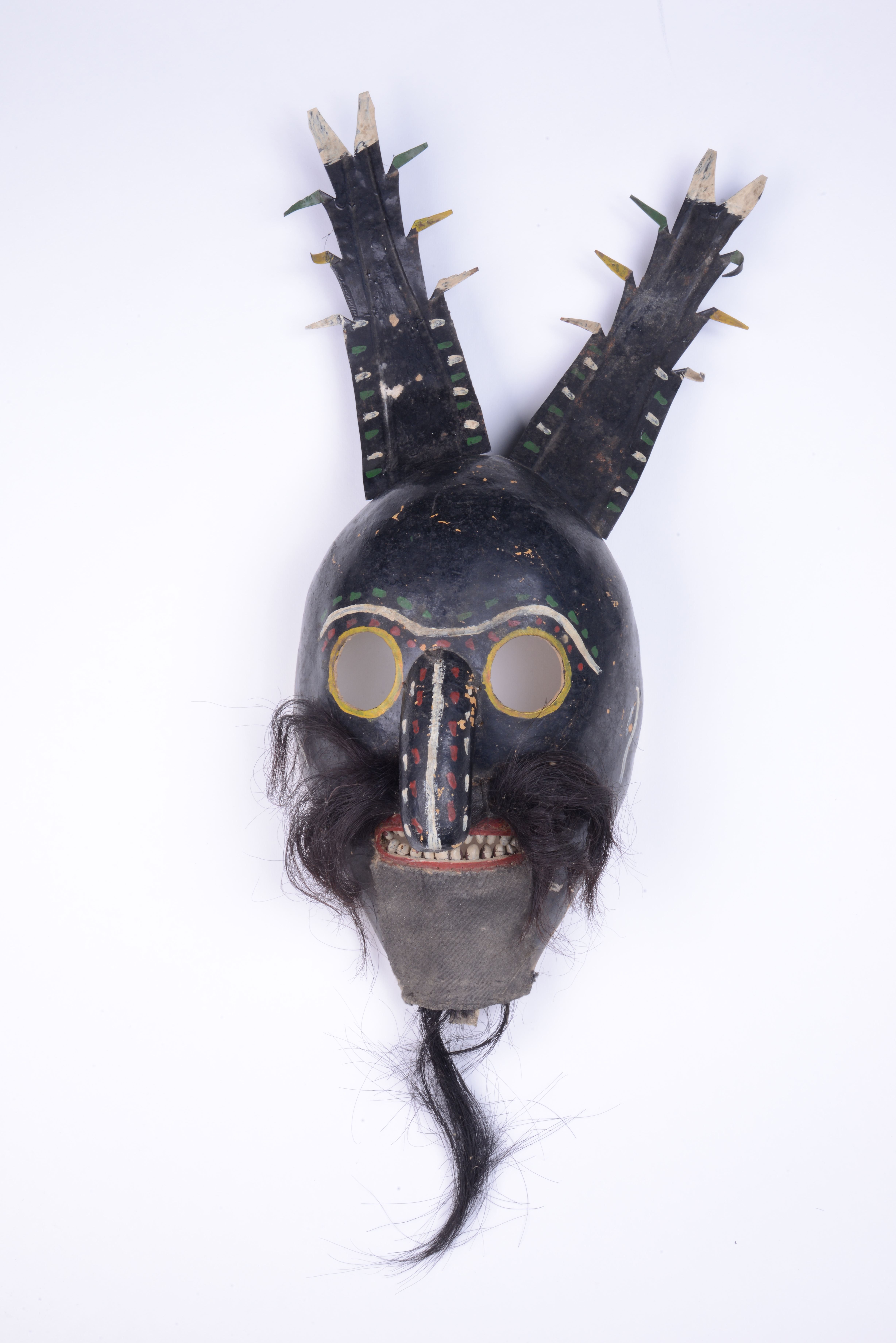 Srpski (latinica): Koledarska maska, XX vek. Otkup od Đ. Stamenkovića iz Pertata, 1968. godine. Maska je rađena od lejke i obojena crnom bojom. Nos je napravljen od lejkine drške, usta su otvorena i vide se beli zubi načinjeni od pasulja. Brkovi i brada napravljeni su od konjskog repa. Maska se nosila u koledarskoj povorci za vreme božićnih praznika. Deo je zbirke predmeta uz običaje (kultni predmeti).